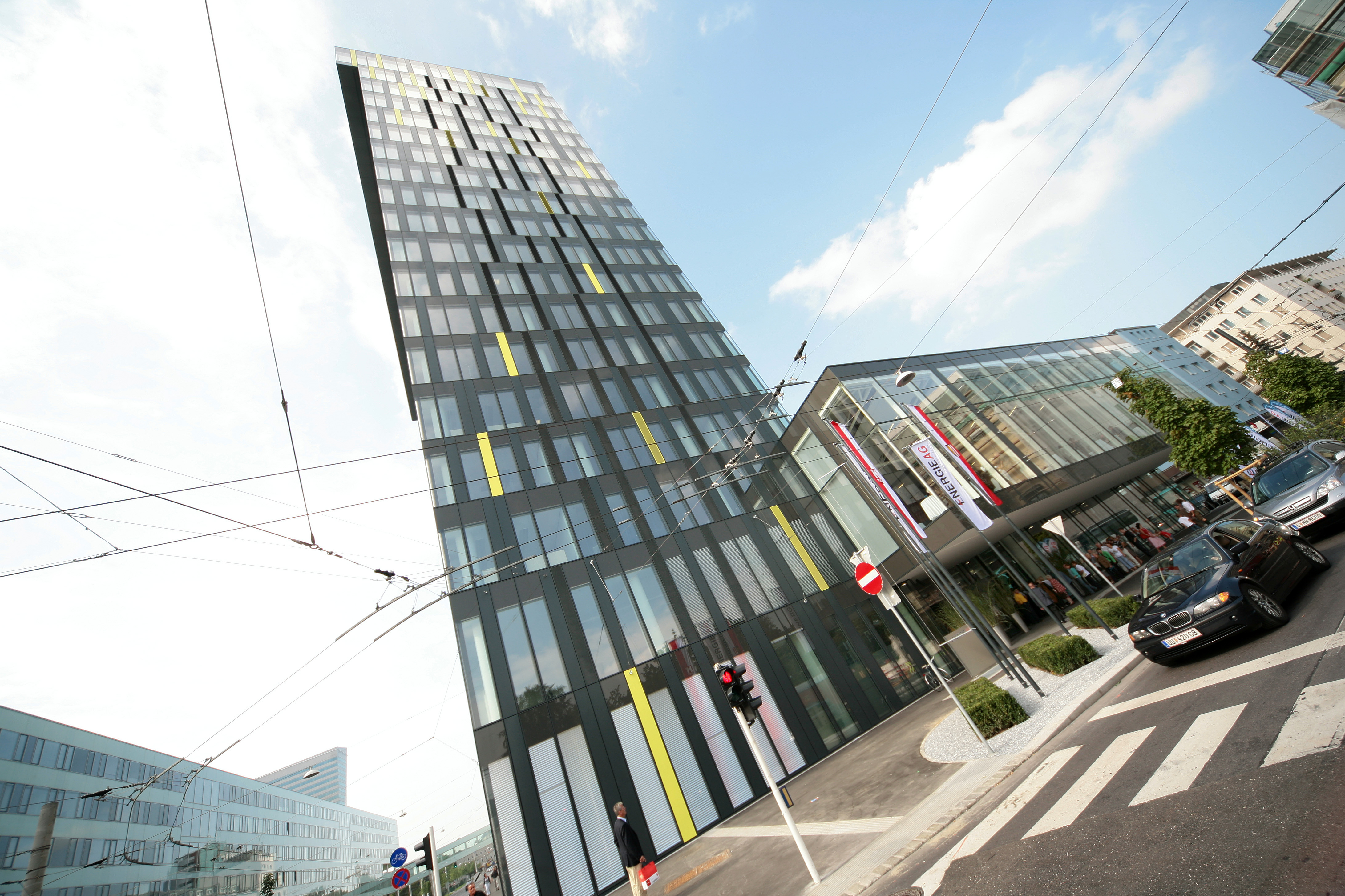 Der Power Tower der Energie AG.